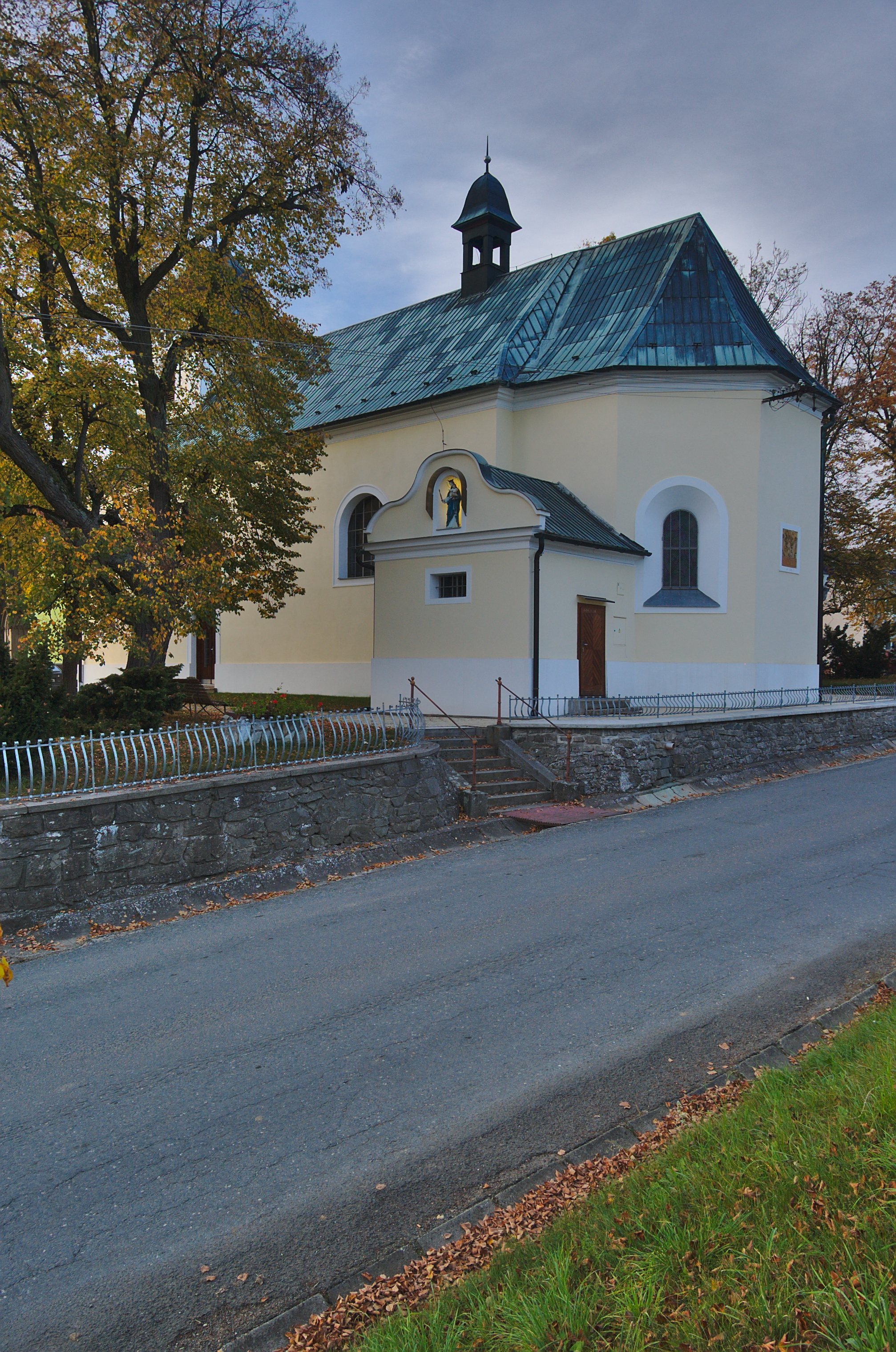 Kostel Nanebevzetí Panny Marie, Laškov, okres Prostějov